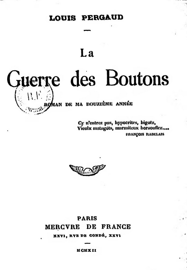 Page de titre de La Guerre des boutons, Le Mercure de France, 1912